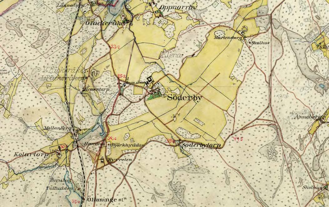 Söderby med omgivning på Häradsekonomiska kartan